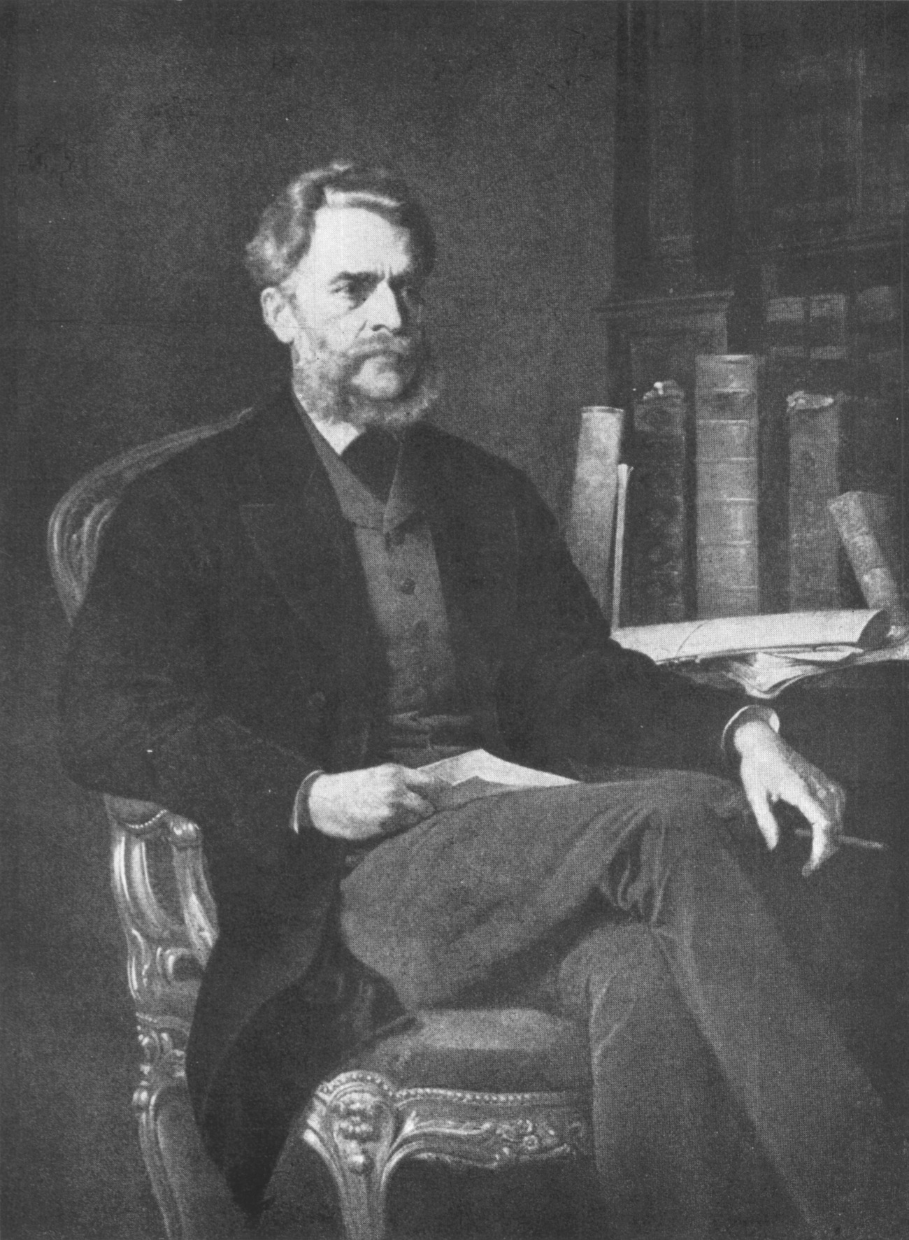 Leo von Thun-Hohenstein (1811–1888)